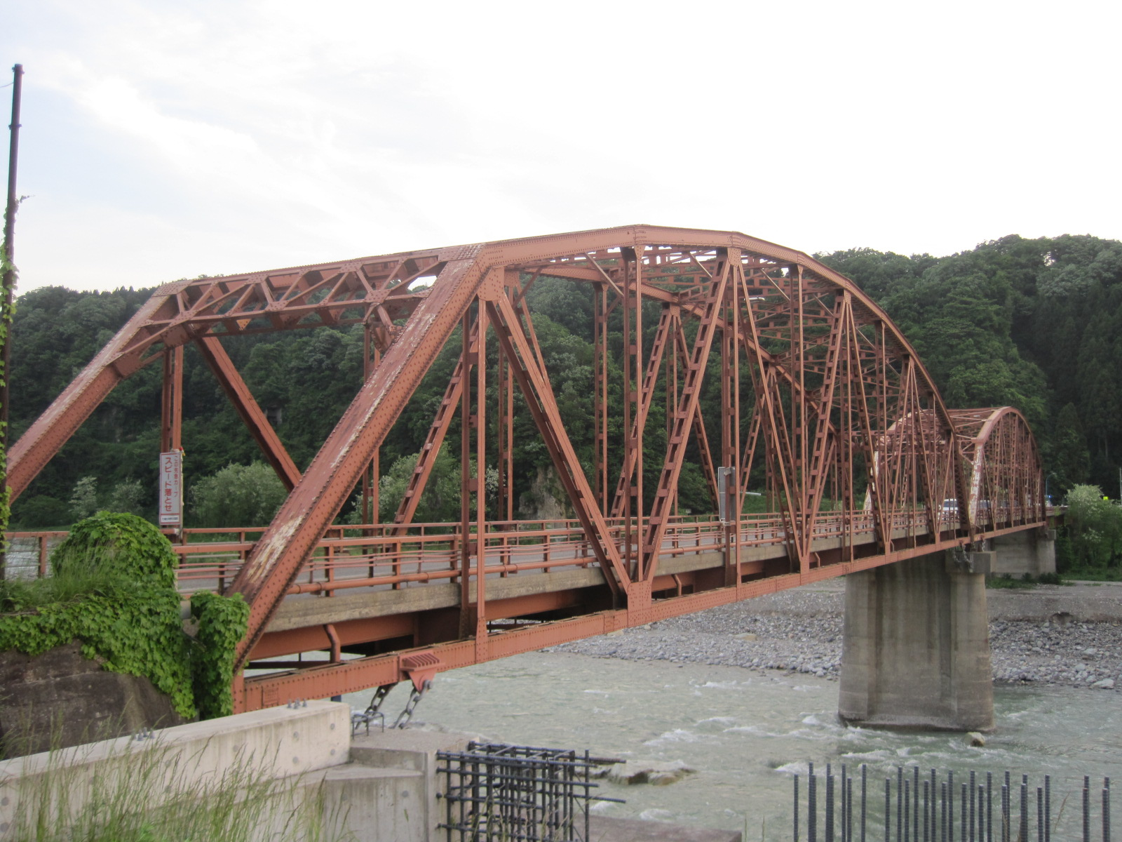 石川県白山市に架かる天狗橋（現存せず）。手取川中流部に位置している。 Canon IXY Digital 110 IS